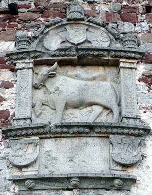 Plošča iz. 16. stol., vzidana v Volovski stolp turjaškega gradu. Vidna je podoba tura, grbi in napis.